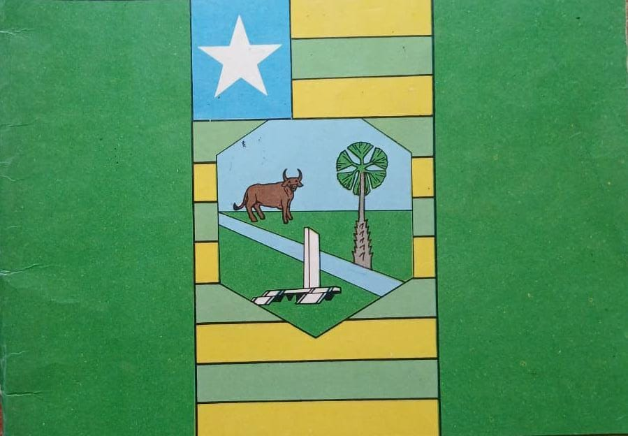 Bandeira do Município de Campo Maior, no estado do Piauí, Brasil, que vigourou de 1968 a 1993. A mesma foi oficializada pelo referido município pela Lei Municipal nº 780/1970.